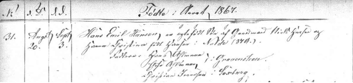 udsnit af opslag i kirkebogen for Burkal sogn for 1867, kolonneoverskrifterne er klistret sammen med indførelsen for Hans Emil Hansen